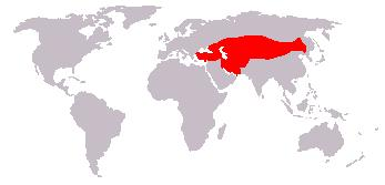 Bewerking afbeelding: Afbeelding_(kaart).JPG